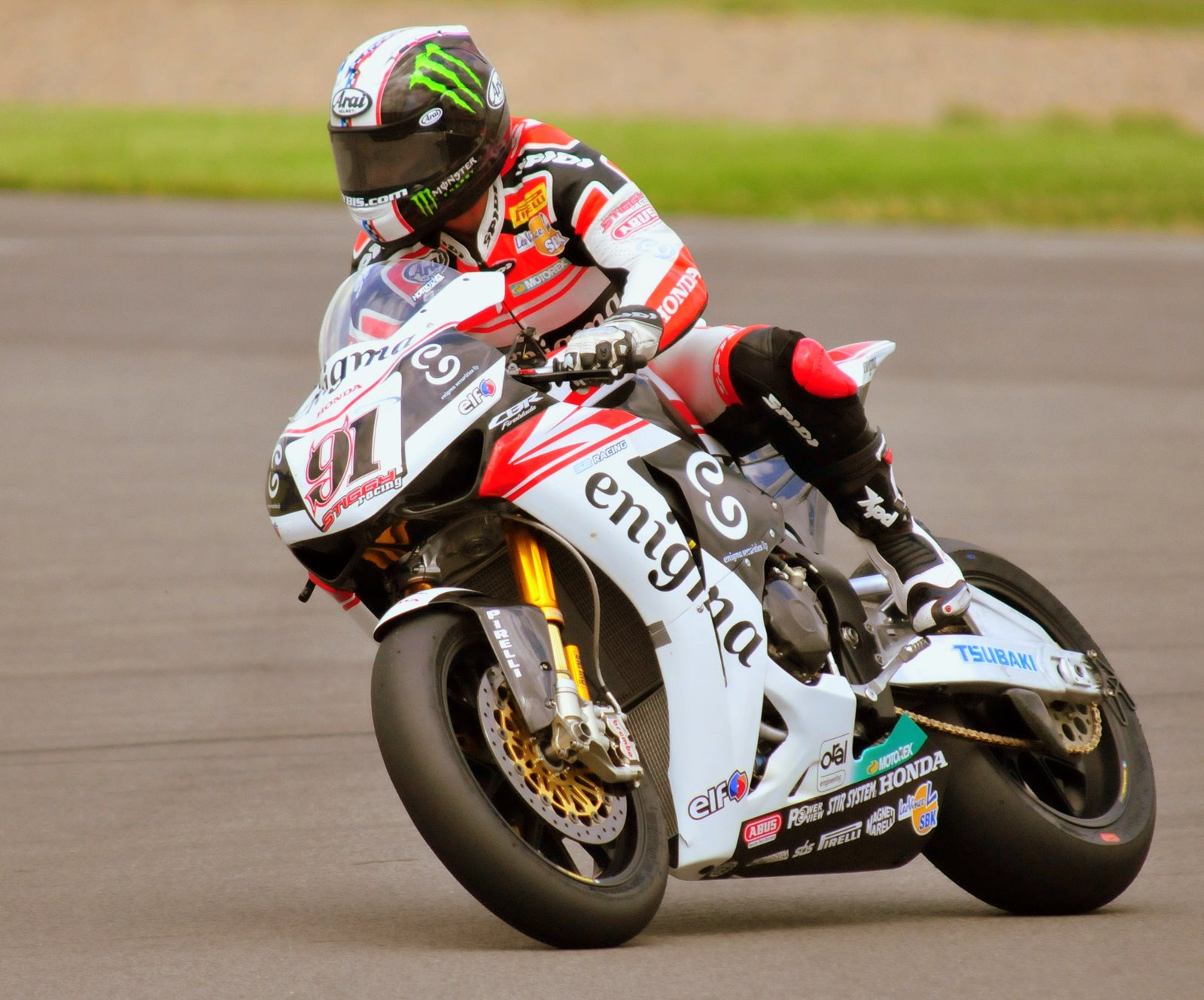 Leon Haslam sulla Honda CBR1000 del Team Stiggy